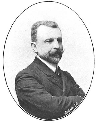 Retrato de Amalio Gimeno y Cabañas, fotografía de Christian Franzen, recogido en la revista española La Ilustración Española y Americana.